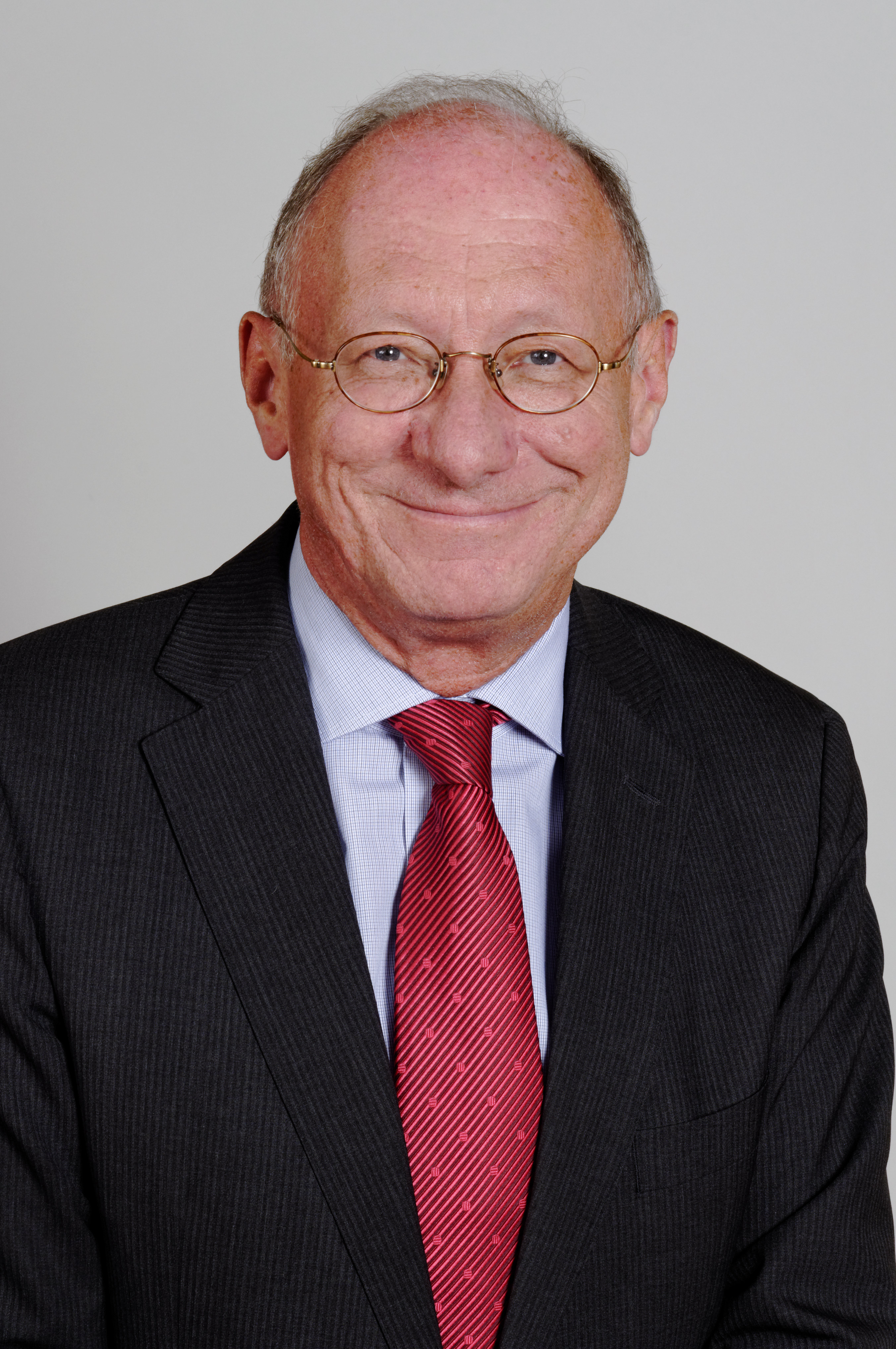 Landtagsprojekt Bayern